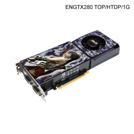 ASUS GeForce ENGTX280 TOP/HTDP/1G